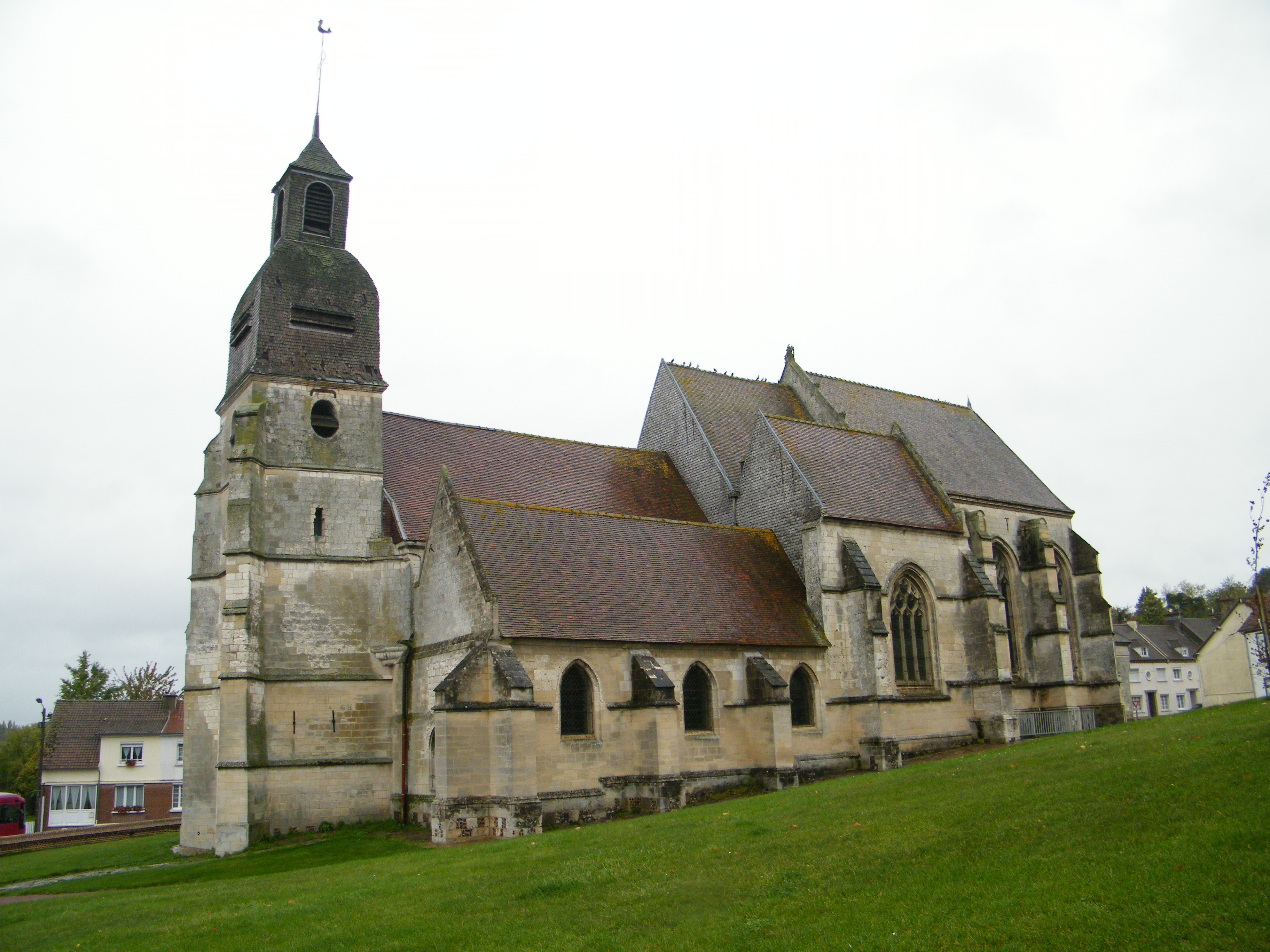 Airaines, Somme, Fr, église Saint-Denis, côté sud.